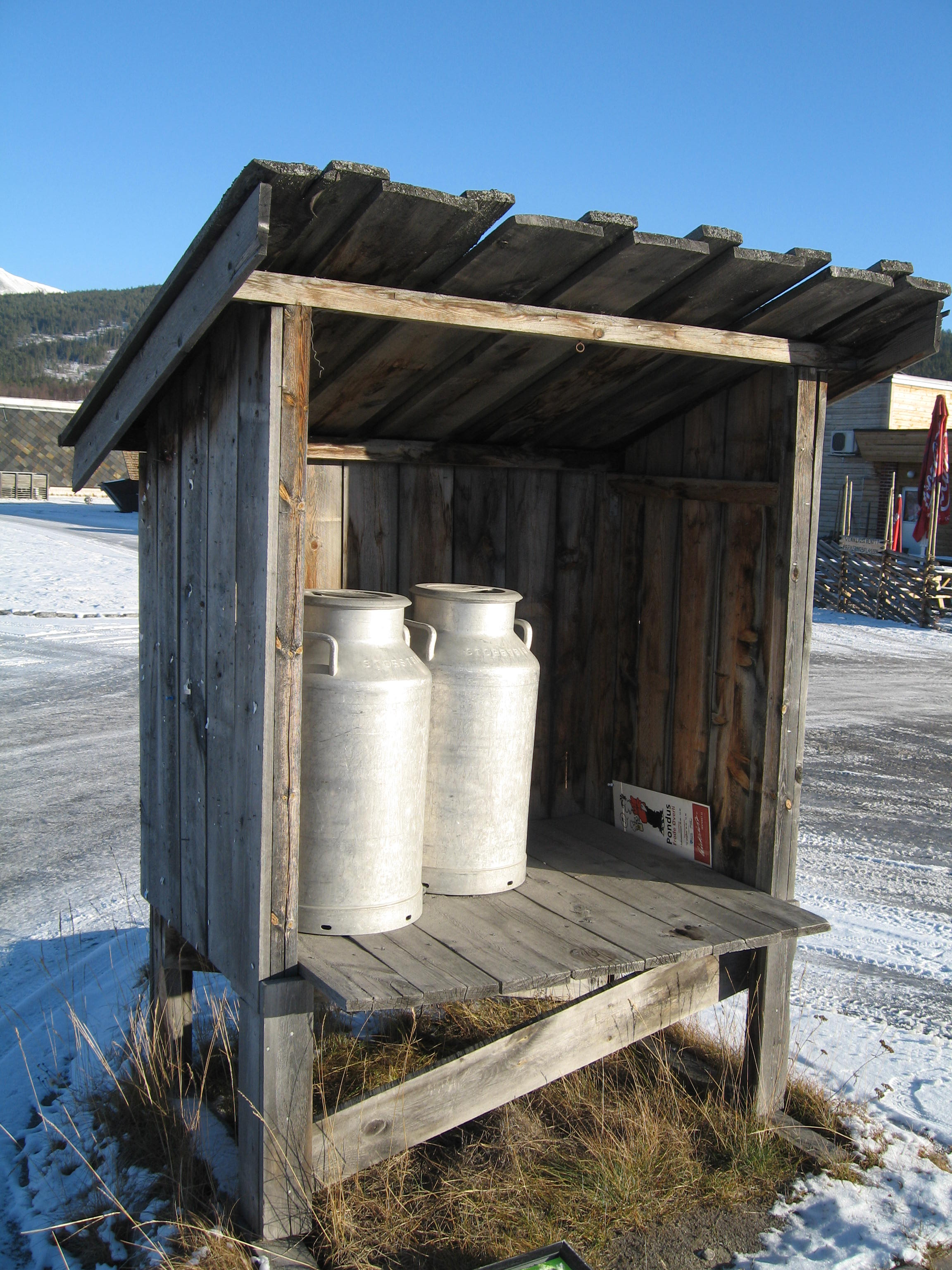 Melkerampe utenfor Aukrustsenteret, Alvdal